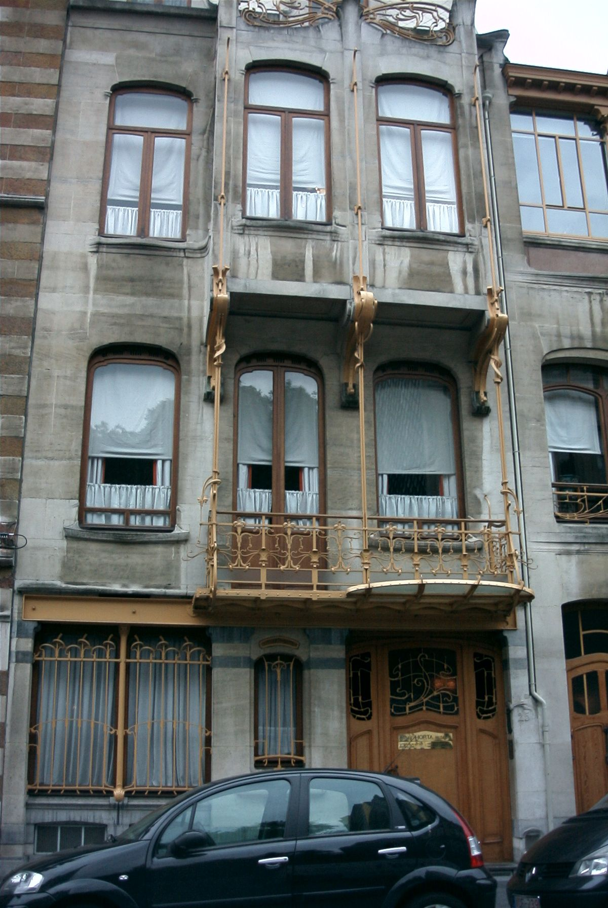 Horta Múzeum, utcafront, Brüsszel